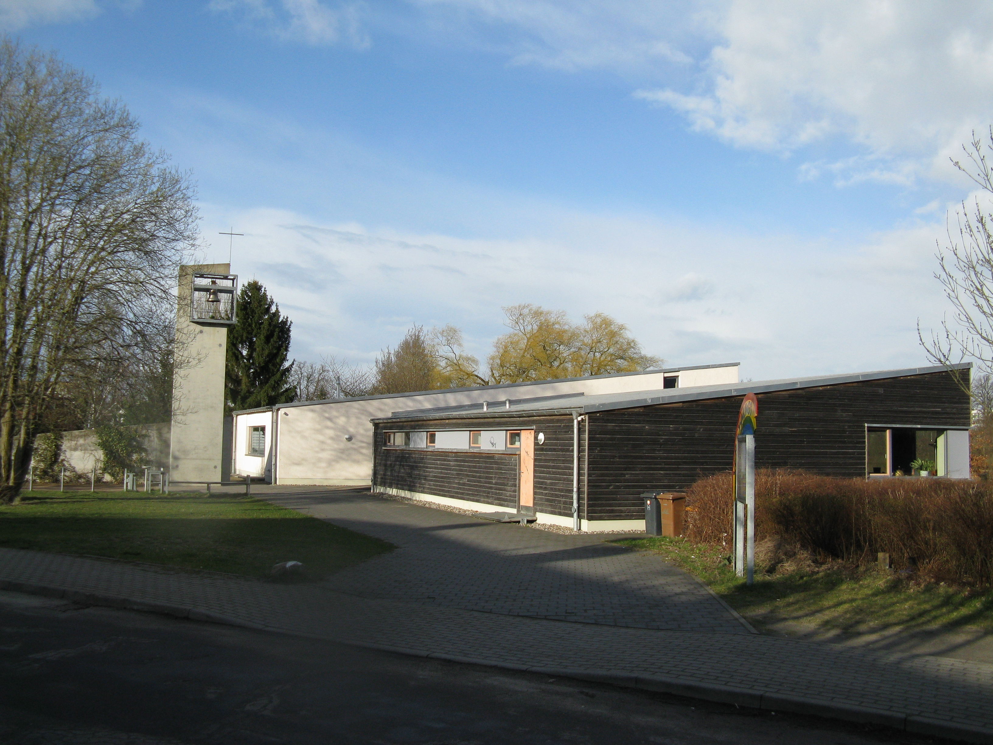 Versöhungskirche (erb. 2001) in Schwerin-Lankow